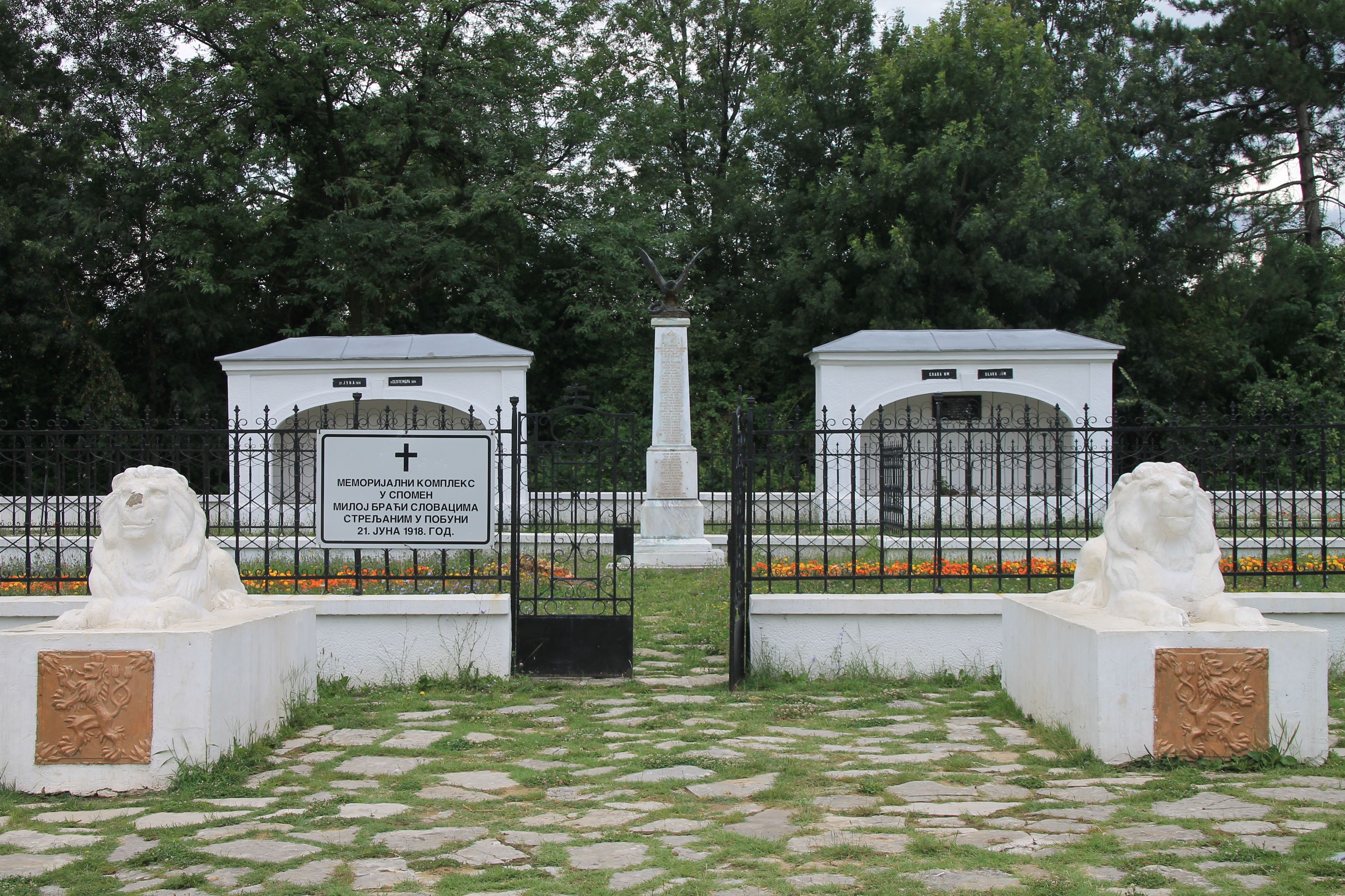 Slovačko groblje u Šumaricama